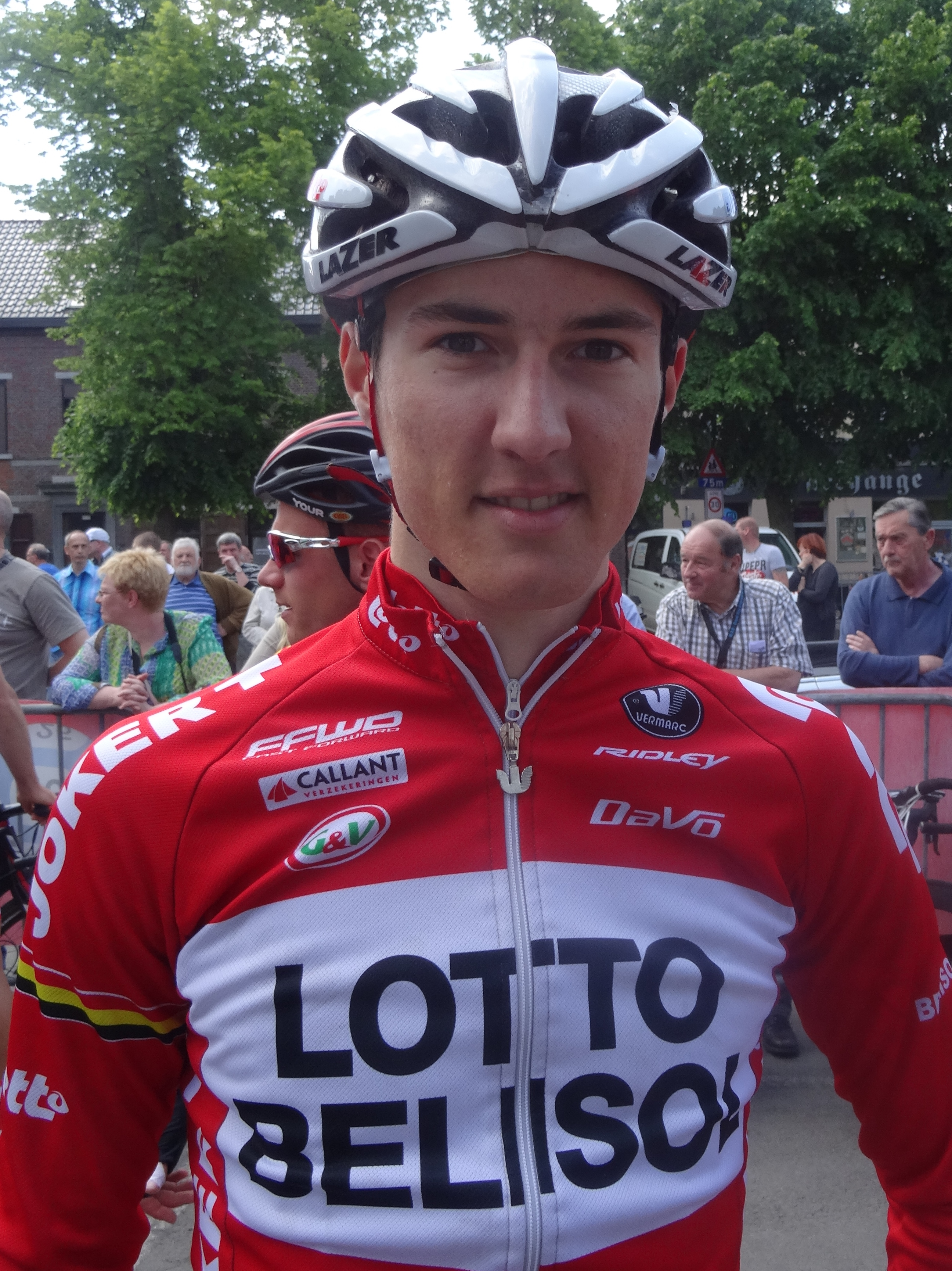 Reportage réalisé le samedi 17 mai à l'occasion du départ du Grand Prix Criquielion 2014 à Boussu, Belgique.